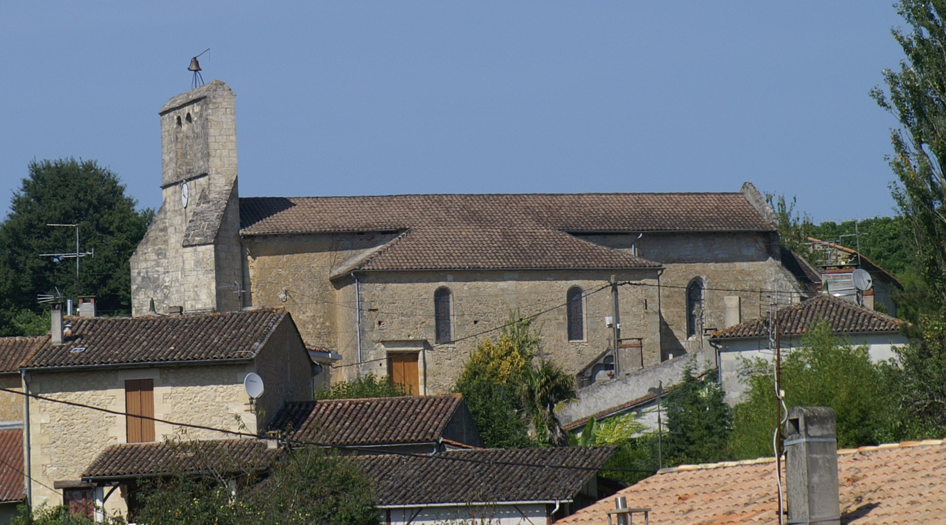 Églisee Saint-Genès de Soulignac, (Inscrit, 1925) .